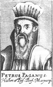 Petrus Paganus, (* 30. März 1532 in Wanfried; † 29. Mai 1576 in Wanfried)